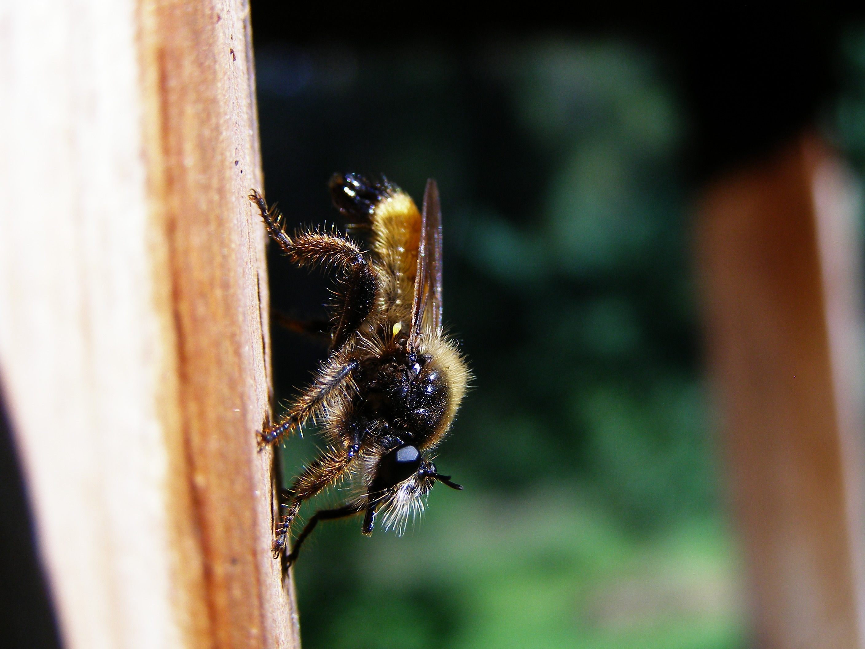 Ruuge-küttkärbes (Laphria flava). Karula rahvuspargis.